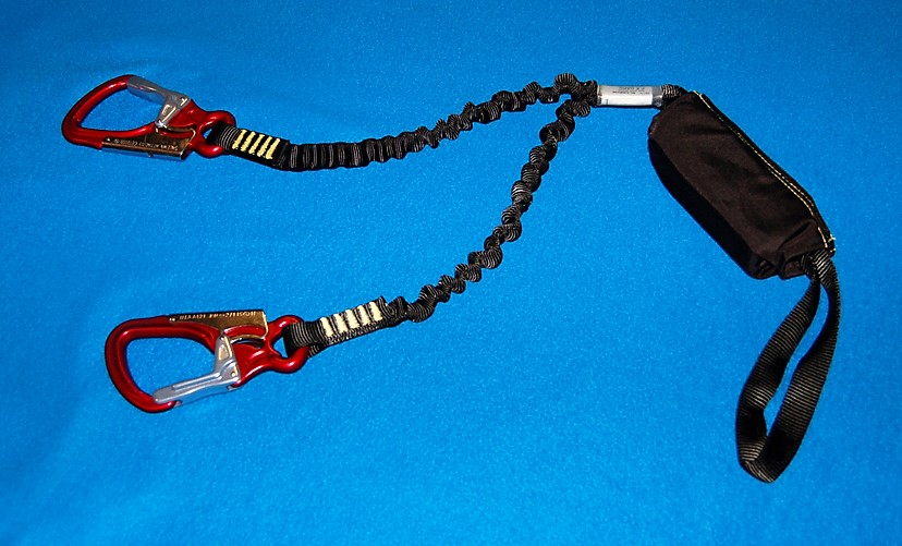 Set da via ferrata, con dissipatore a lacerazione. Marca Salewa.